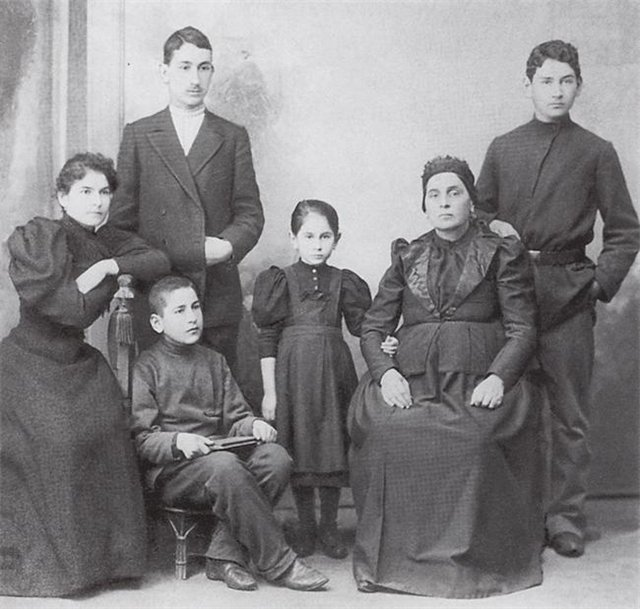 Мартирос Сарьян с семьёй